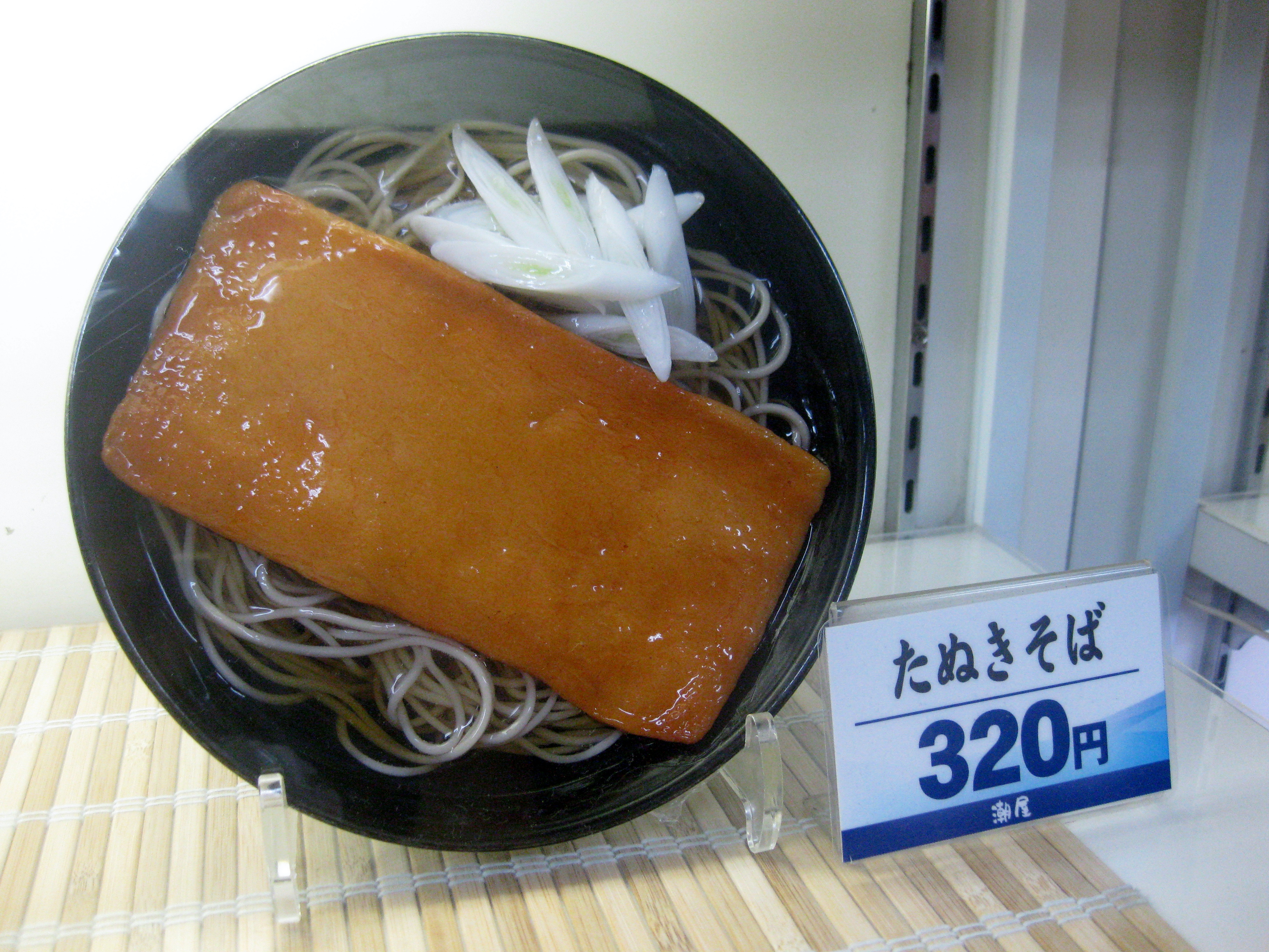 大阪のたぬきそば。新梅田食道街にて。